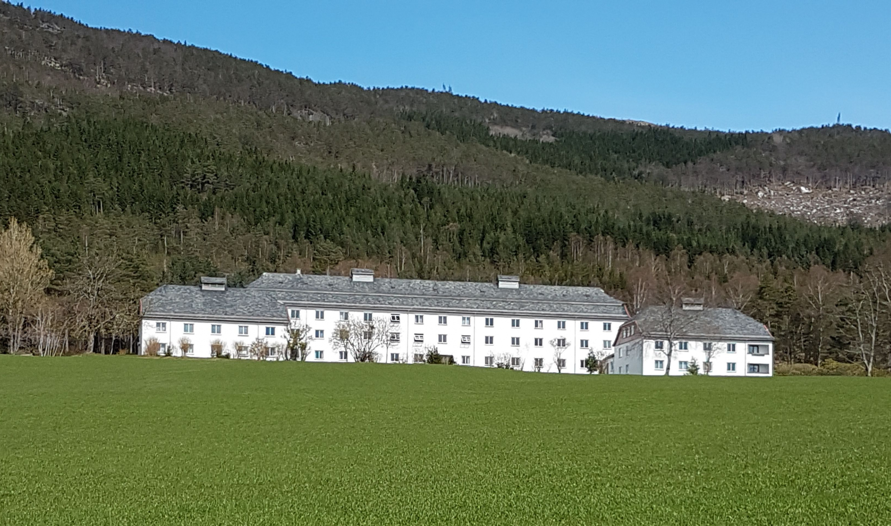 Søsterheimen. Foto: Roger Grimelid. Fra Riksantikvarens Kulturminnesøk.